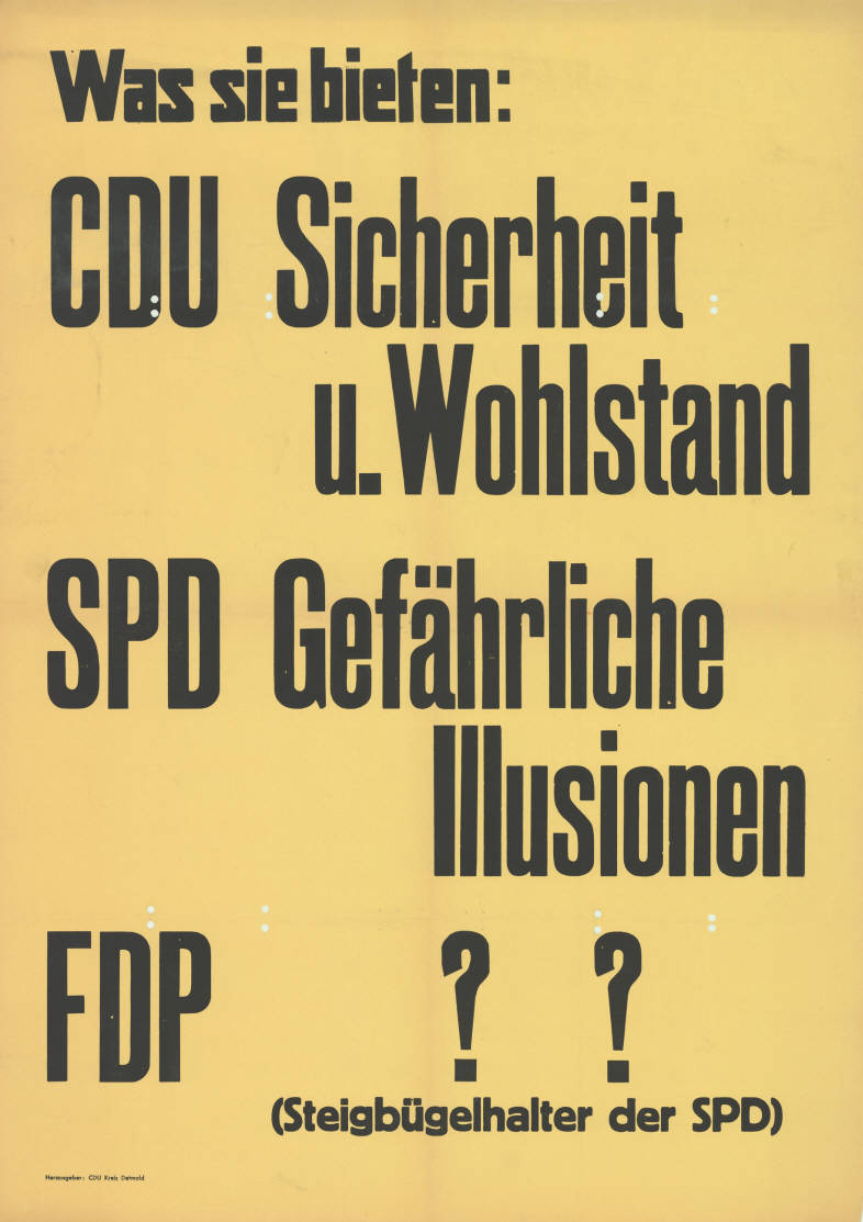 Was sie bieten: CDU Sicherheit u. Wohlstand SPD Gefährliche Illusionen FDP ?? (Steigbügelhalter der SPD) Plakatart: Textplakat Allgemein Auftraggeber: CDU Kreis Detmold Objekt-Signatur: 10-009 : 436 Bestand: Landtagswahlplakate Nordrhein-Westfalen (10-009) GliederungBestand10-18: Landtagswahlplakate Nordrhein-Westfalen (10-009) » Landtagswahl am 6.7.1958 » Motiv-/Textplakate Lizenz: KAS/ACDP 10-009 : 436 CC-BY-SA 3.0 DE